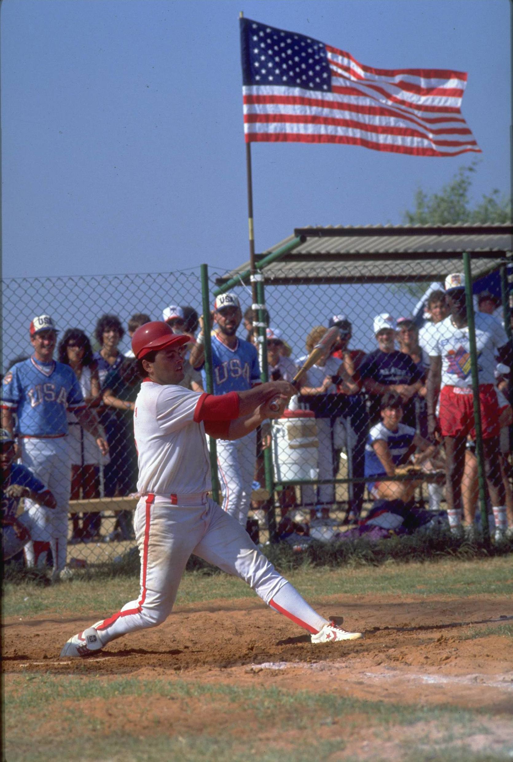 A SOFTBALL GAME IN TEL AVIV, DURING THE 12TH MACCABIA GAMES. משחקי המכביה ה-12 בתל אביב. תחרות הסופטבול